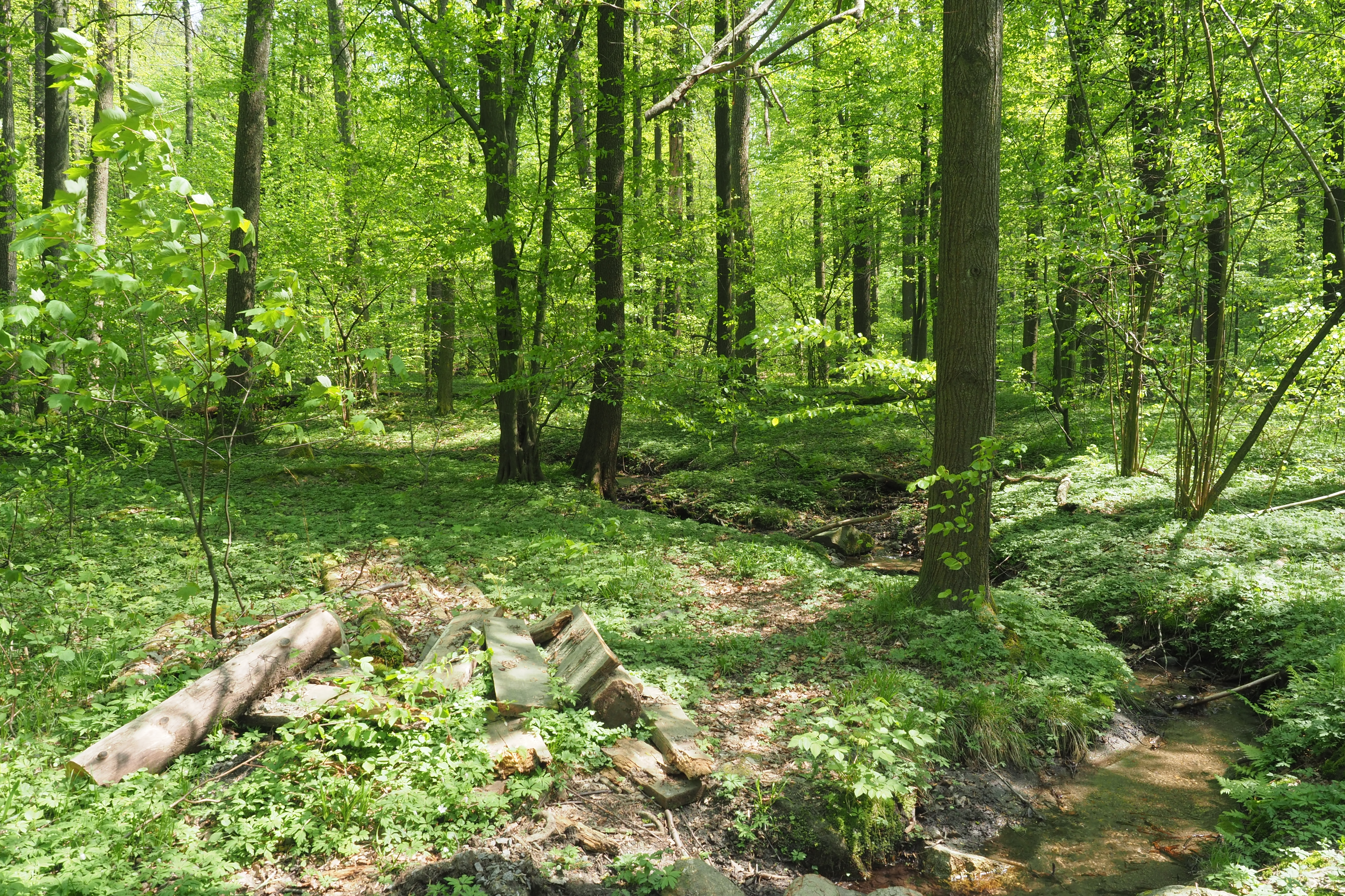 Naturschutzgebiet Gimpelfang in Sebnitz am Fuße des Tanzplan